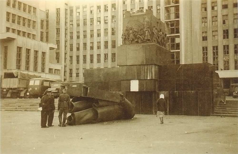 Беларуская (тарашкевіца): Менск (Miensk), Дом ураду (Dom uradu)